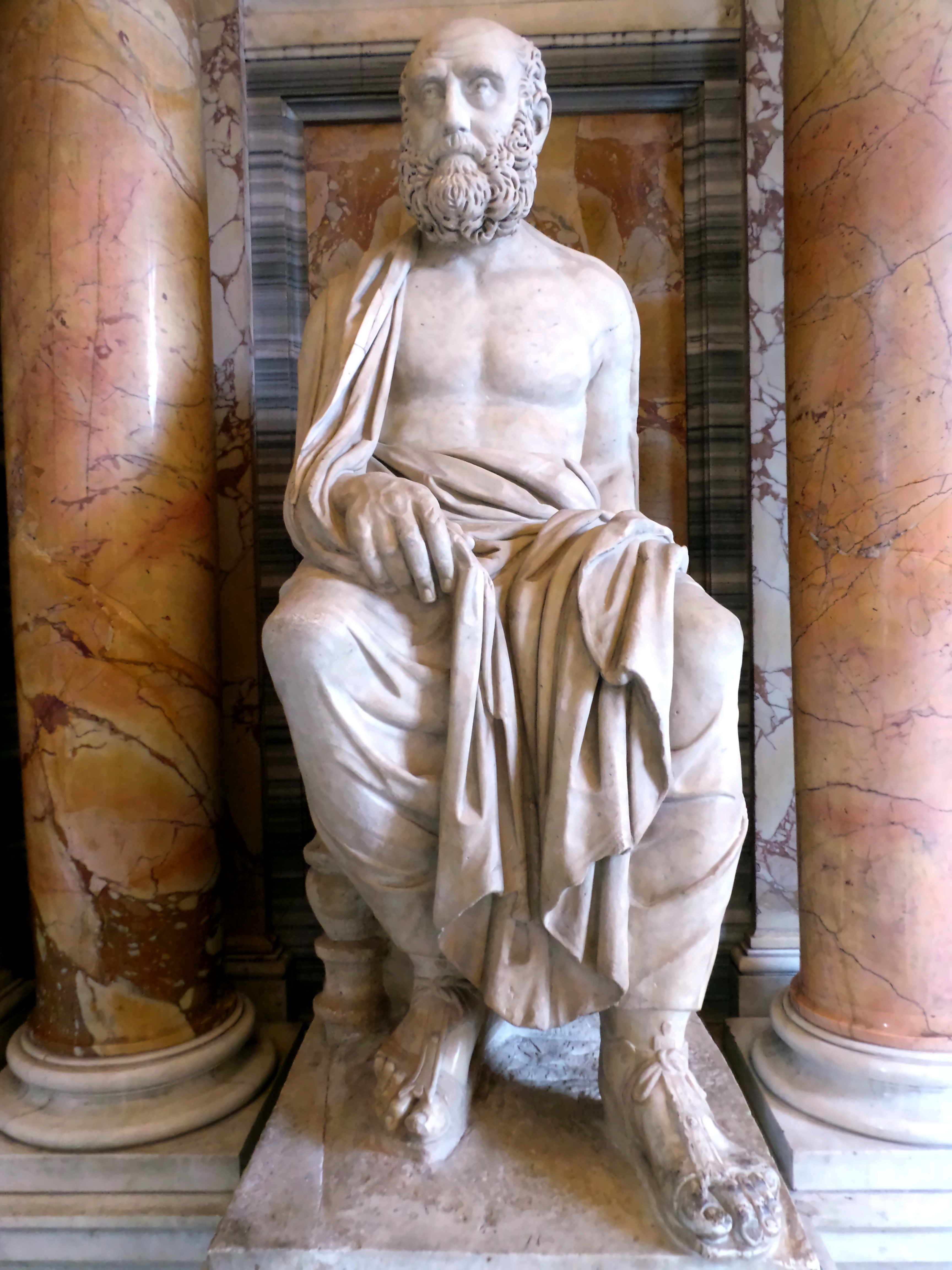 Statue des Aelius Aristides. Eine Kopie aus dem 2. Jahrhundert. Ausgestellt in den Vatikanischen Museen.